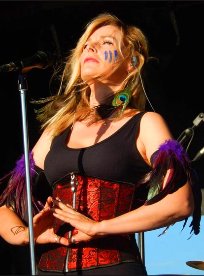 Kohann 13 08 2015 Ploemeur 2